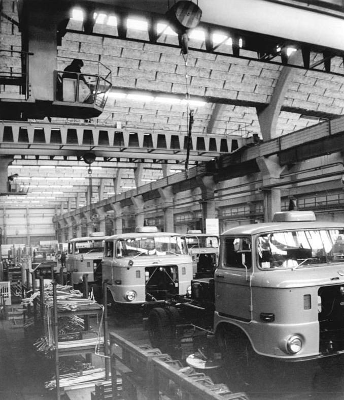 ADN-ZB-Zimmermann-20-9-78-Berlin: Am 28. Oktober werden vom Reißbrett bis zur Endmontage im VEB Spezialfahrzeugwerk Berlin alle Arbeitsplätze besetzt sein. Die 850 Belegschaftsmitglieder beschlossen als Antwort auf den Aufruf der Elektroköhler an diesem Tag eine Warenproduktion von insgesamt 200000 Mark zu realisieren. Blick in die Endmontage für Straßenkehrmaschinen.